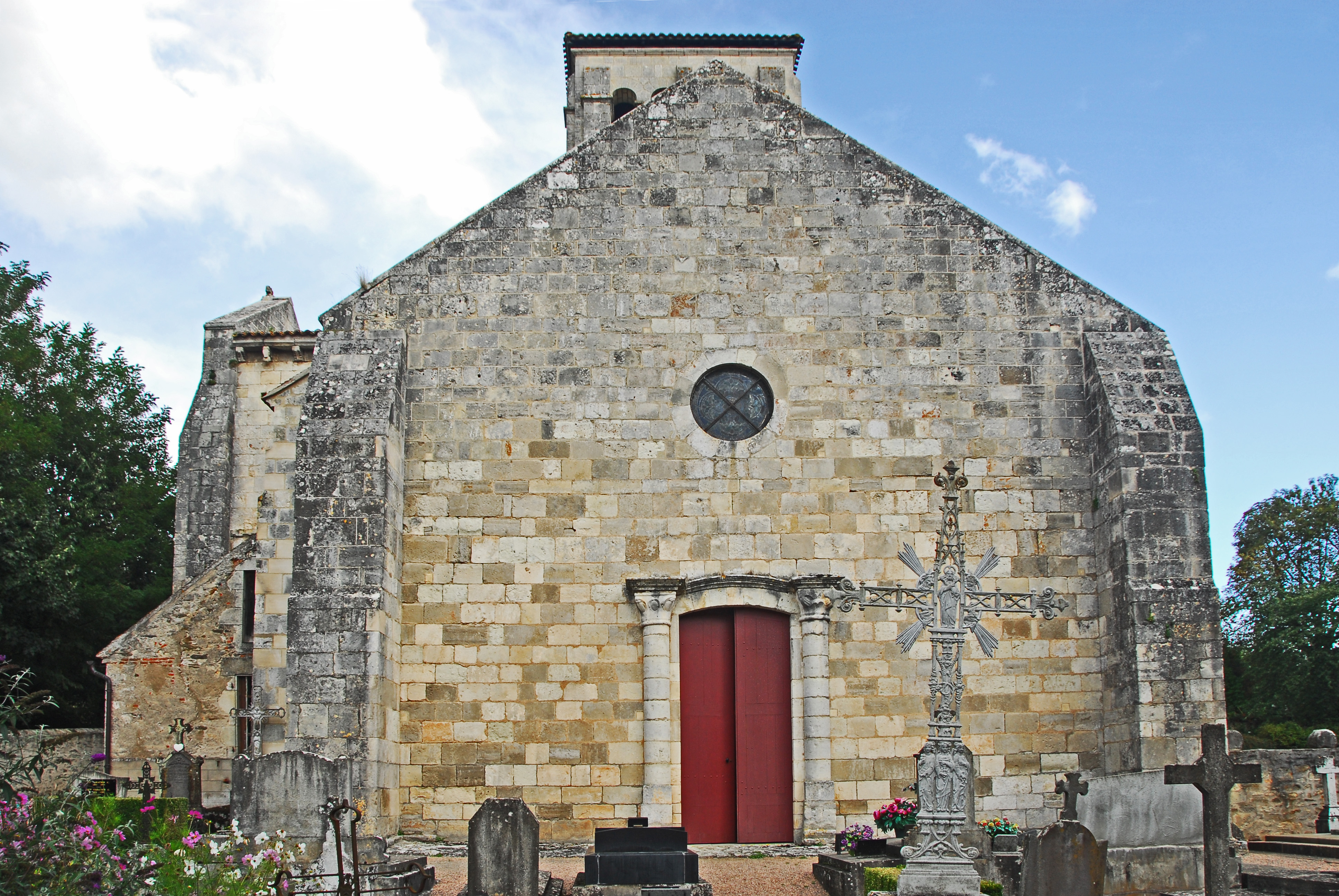 Ste-Croix de Veauce, Ersatzfassade von W